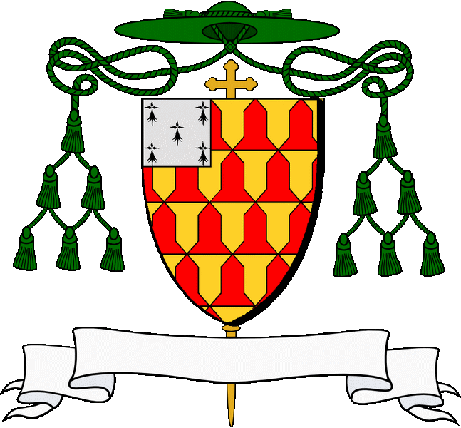 Brizhet etre aour ha gwad; e c'hrenngonk en arc'hant karget gant pemp erminig lammellet